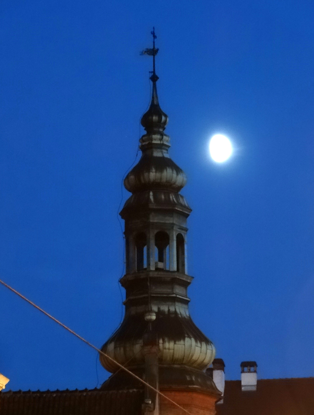 Kościół p.w. Wniebowzięcia Najświętszej Marii Panny w Bydgoszczy (zbud. 1582-1615, do 1835 r. kościół klasztorny klarysek bydgoskich)